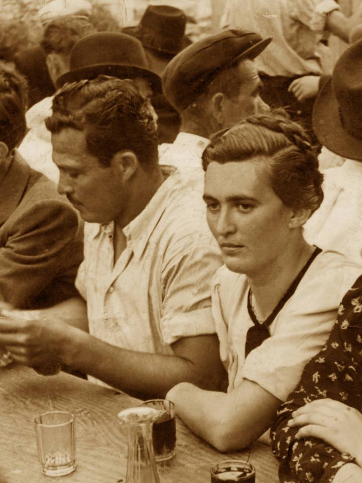 Иван и Аница Брньац, родители Станко Мольнара, фото сделано в 1941 году